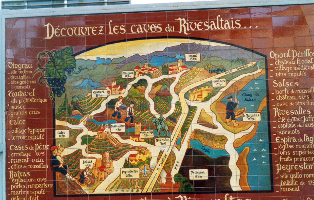 Rivesaltes